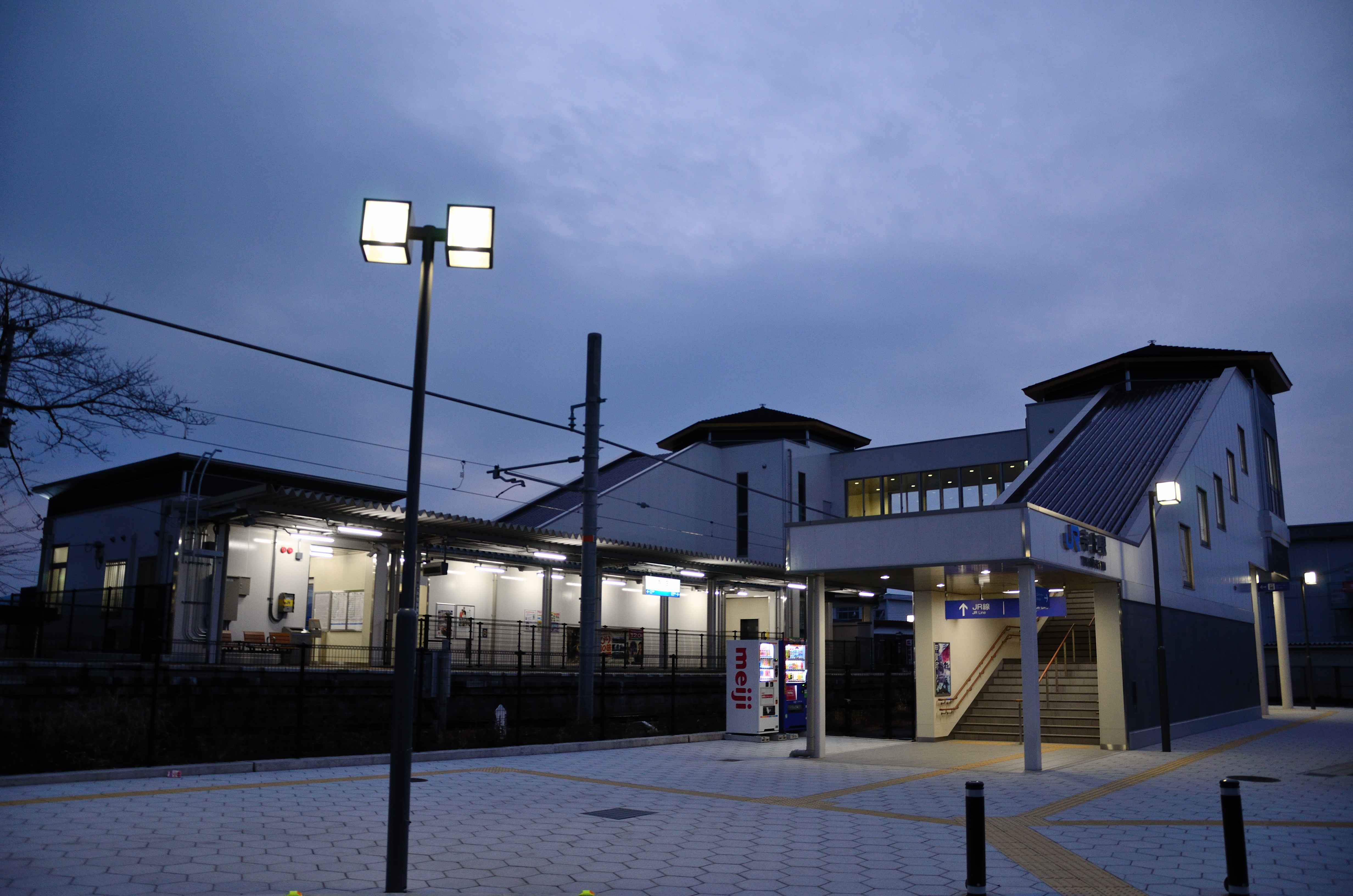 寺庄駅北口